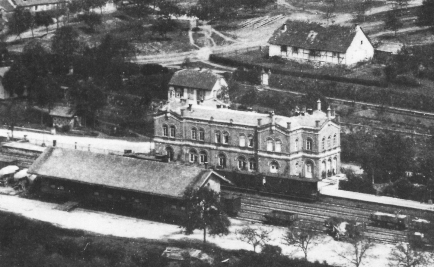 ehemaliger Bahnhof "Carlshafen linkes Ufer" - Aufnahme: Foto-Fritz 1877 - scan Feb. 2006 - Quelle Deutsche Gesellschaft für Eisenbahngeschichte e.V.